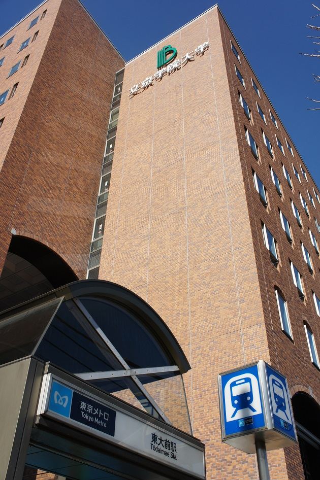 新S館校舎と、最寄り駅である東京メトロ南北線東大前駅出口。